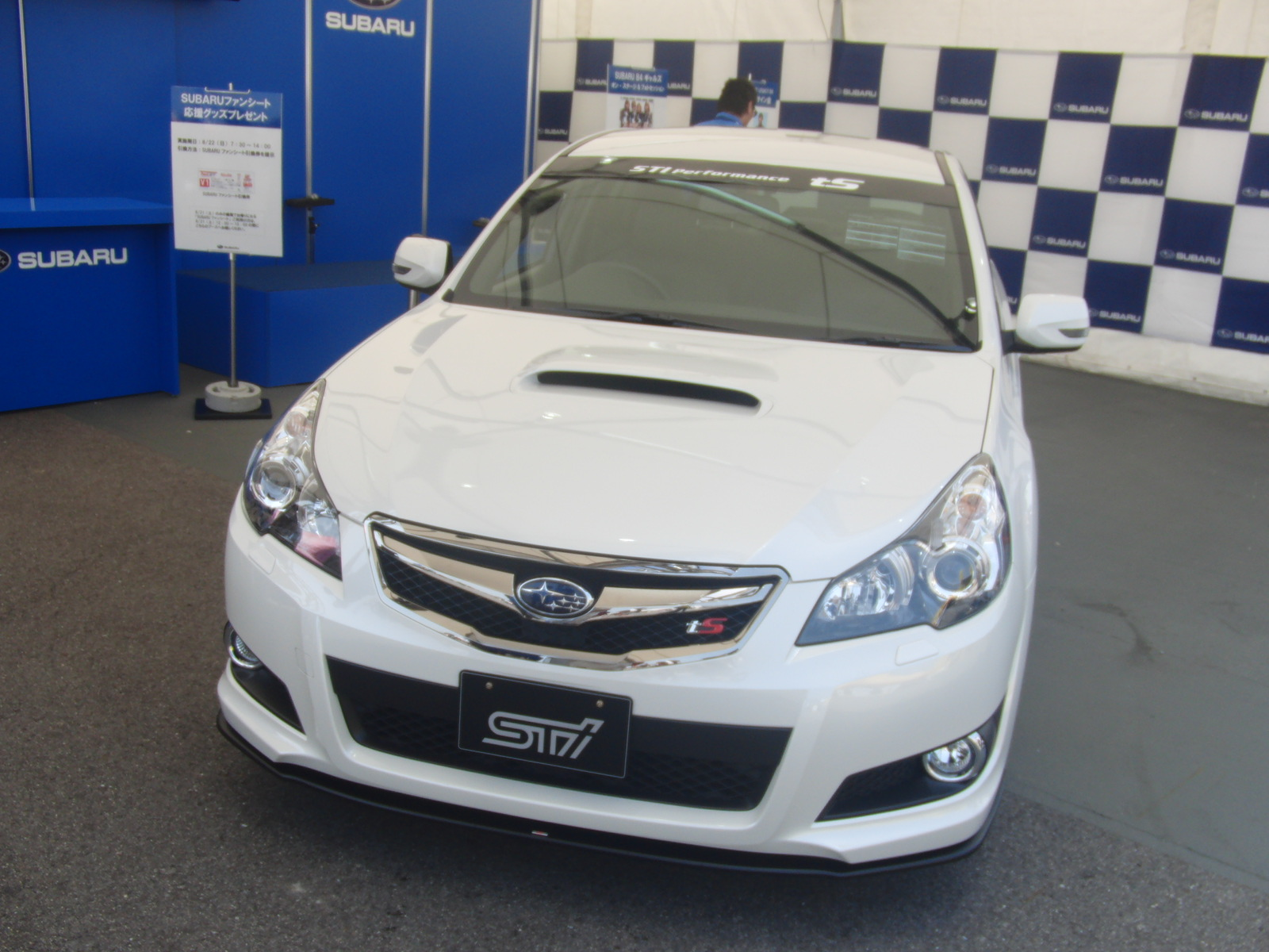 スバル･レガシィB4 2.5GT tSを撮影。